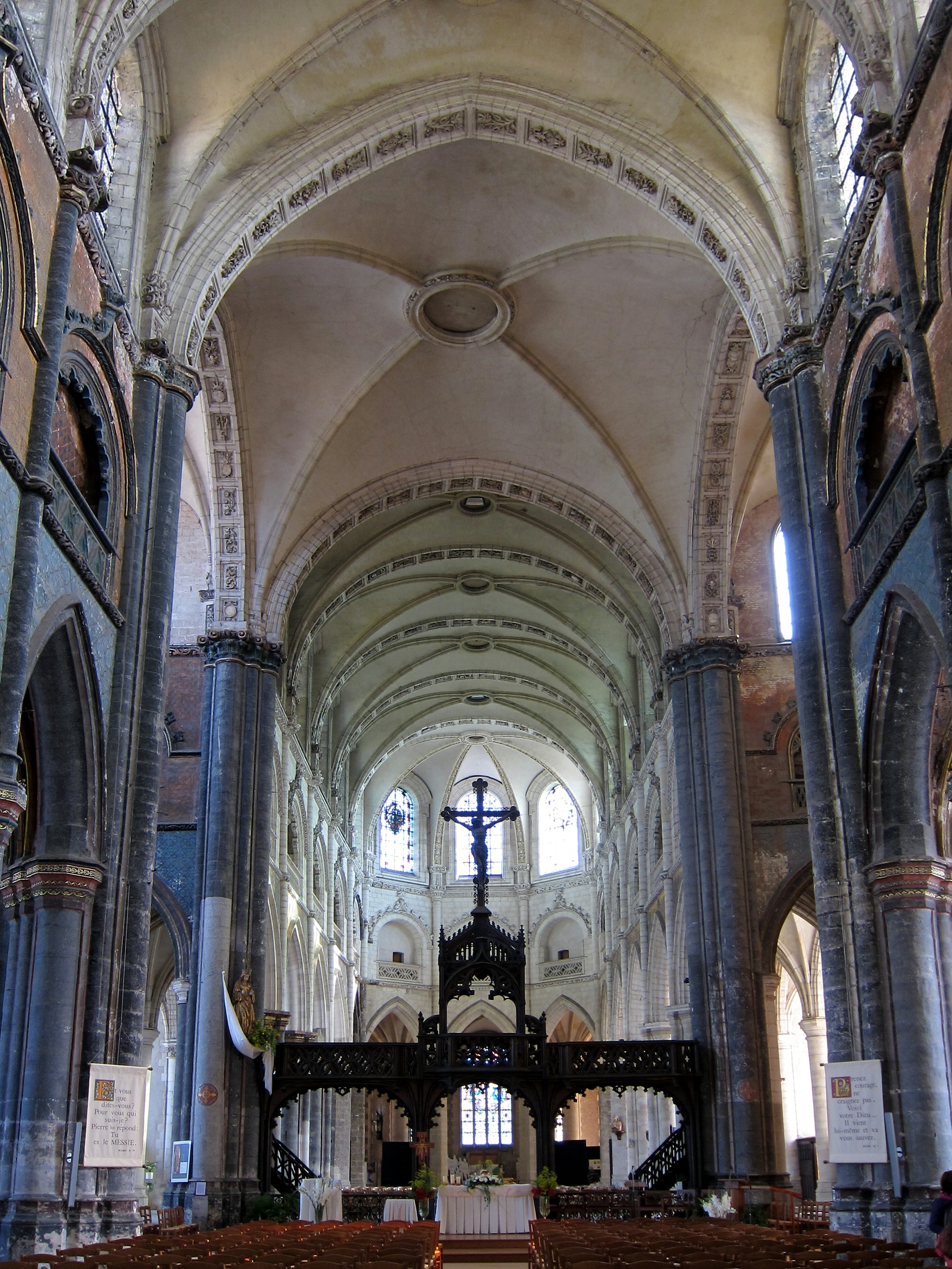 La nef de la collégiale Saint-Pierre d'Aire-sur-la-Lys.